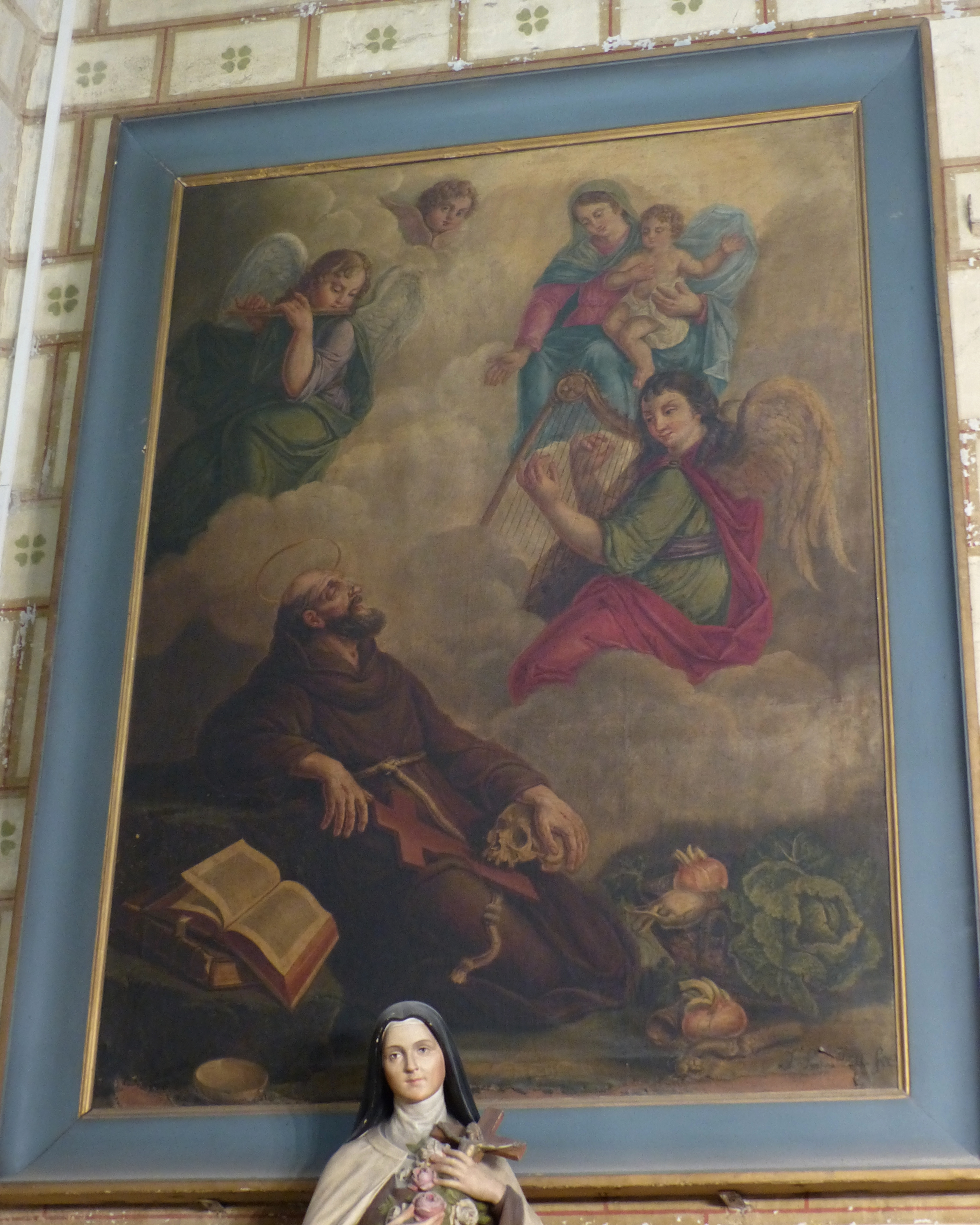 Montpellier (Hérault, France), au cœur du quartier historique de l'Écusson, l'intérieur de l'une des plus anciennes églises de la ville, inscrite en totalité en tant que Monument Historique, et exceptionnellement accessible pour les Journées du Patrimoine; deuxième chapelle septentrionale dédiée à St Antoine-de-Padoue; toile St Jérôme en méditation par Jean-Jacques Bestieu.